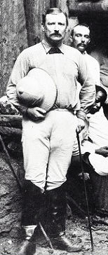 Titus van Asch van Wijck (1849-1902)